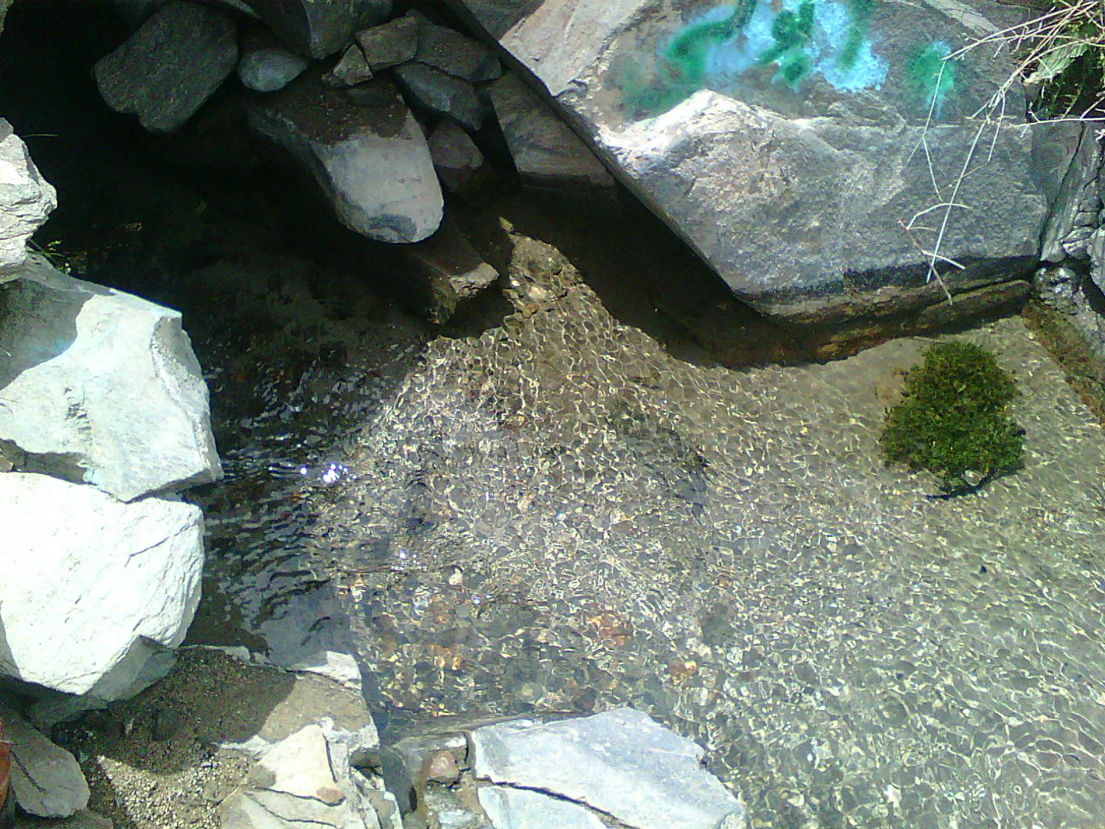 چشمه آب شیرین الوند